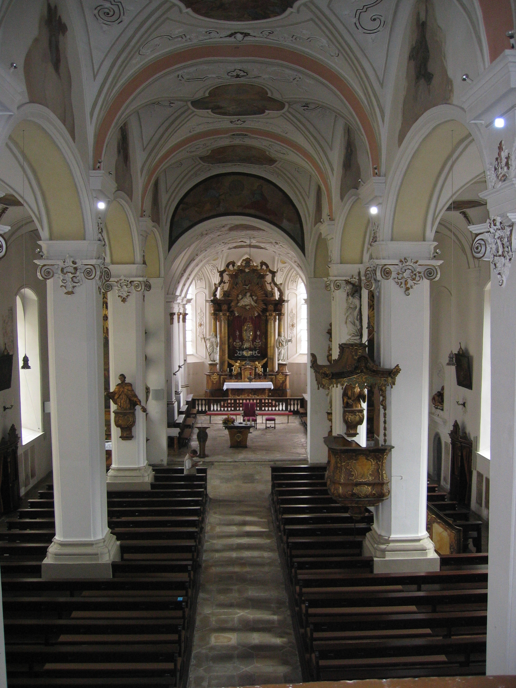 Innenansicht der Marienkirche, Ellwangen (Jagst)